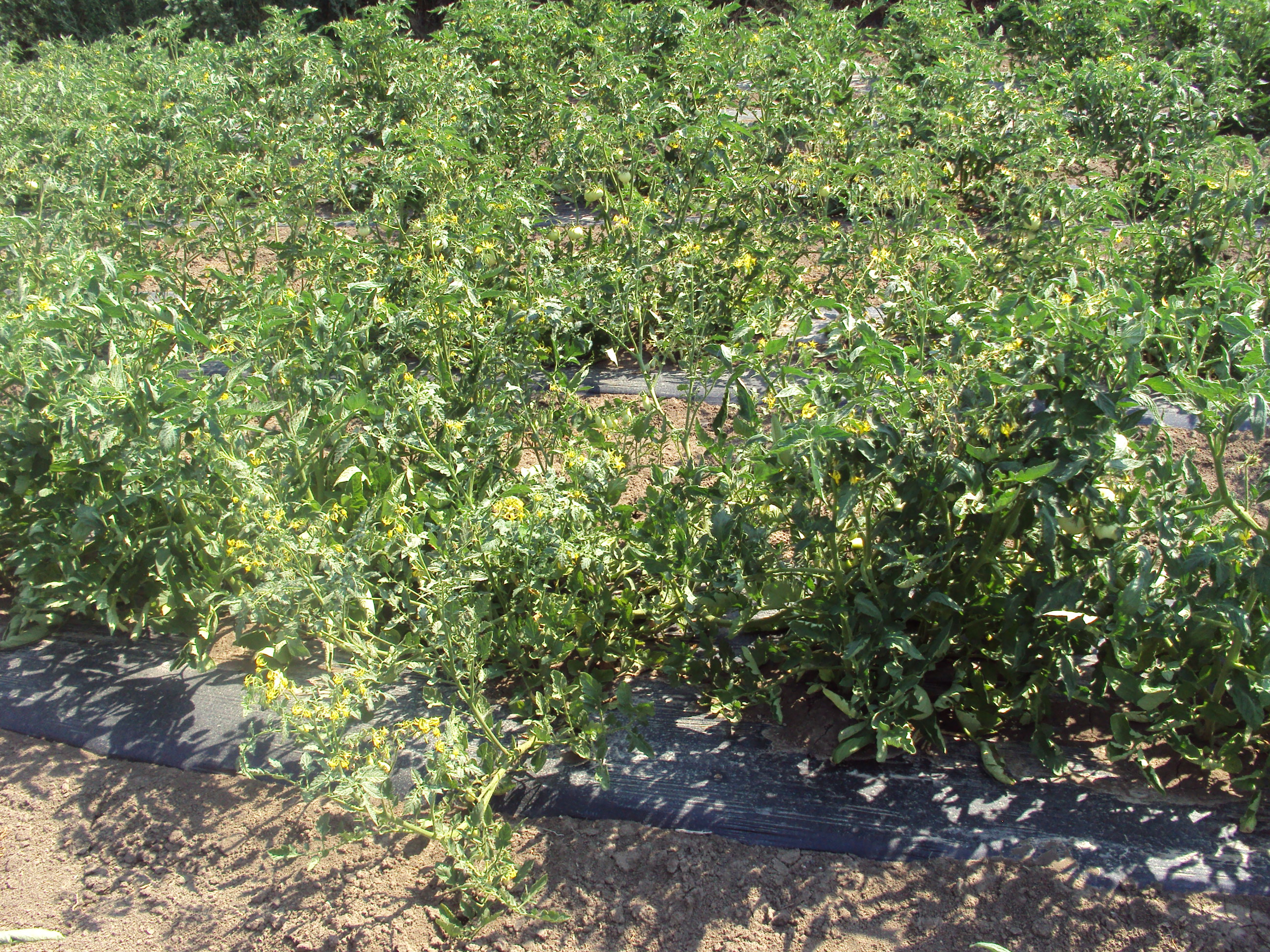 Фаза цветања